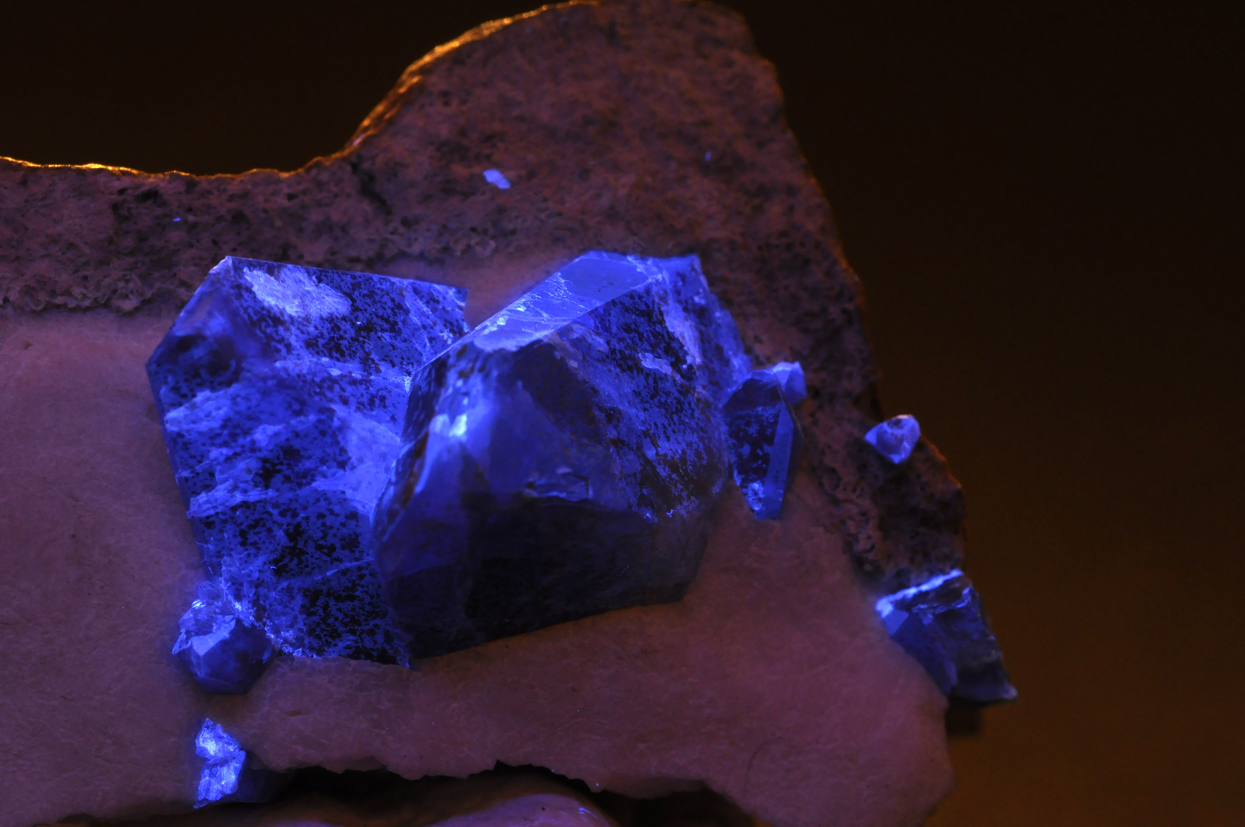 bénitoïte, neptunite sous rayonnement ultra-violet : Dallas Gem Mine (Benitoite Mine ; Benitoite Gem Mine ; Gem Mine), Dallas Gem Mine area, San Benito River headwaters area, New Idria District, Diablo Range, San Benito Co., California, USA.